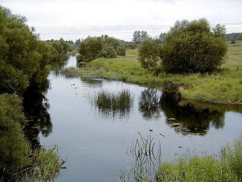 Tronçon de Rītupe près de Kārsava en Lettonie.